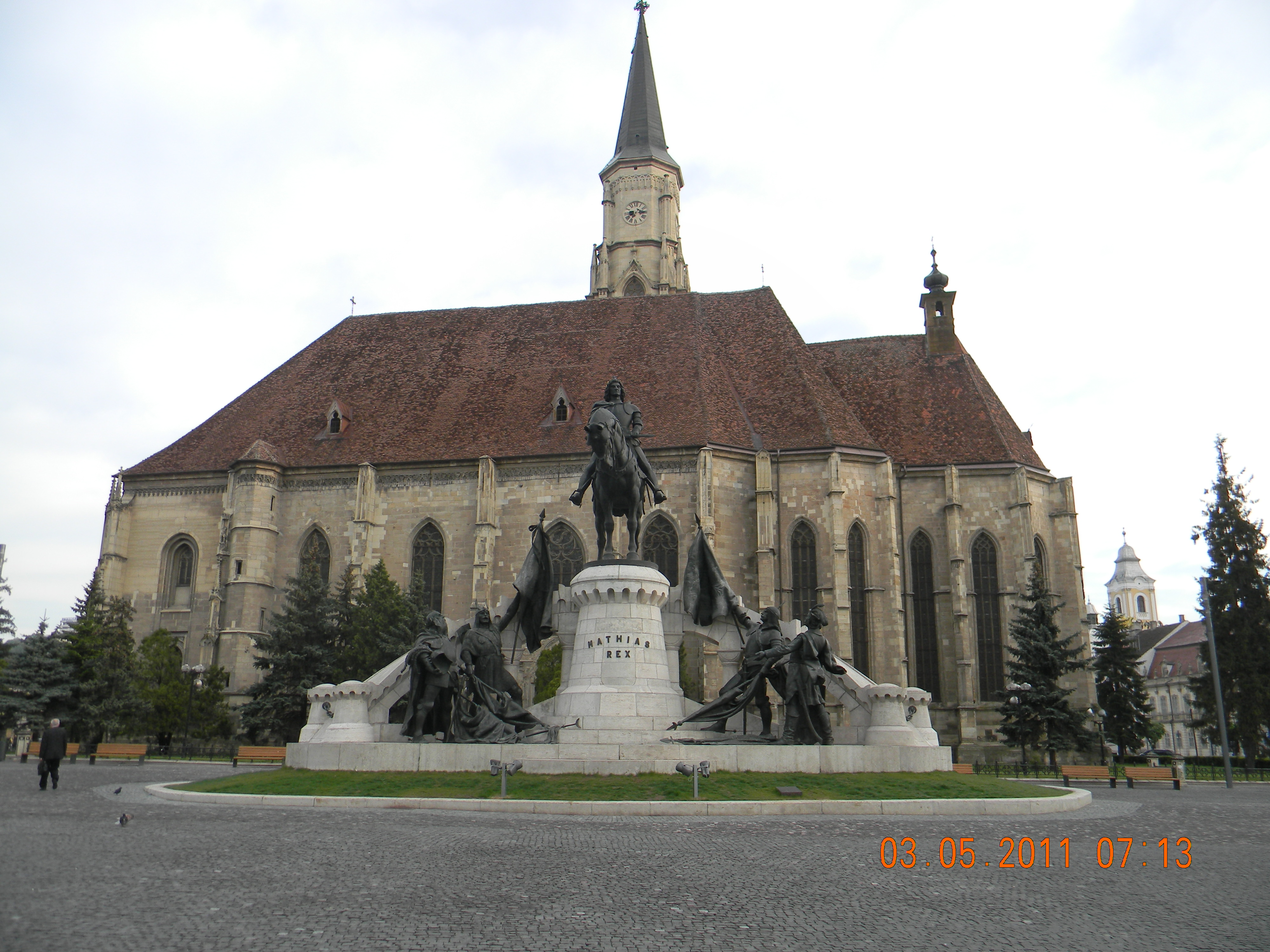 centru Piața Unirii